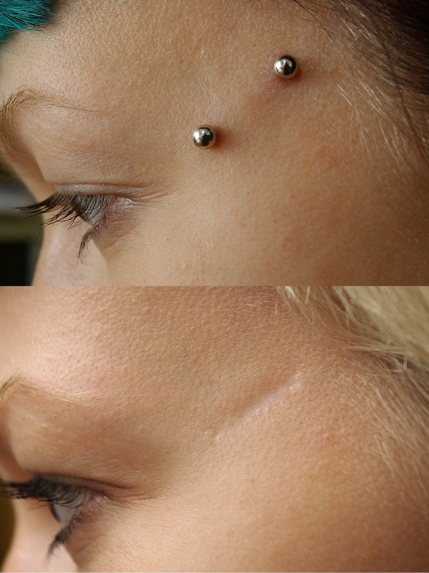 Oberflächenpiercing an der Schläfe Uploaded with Reworkhelper